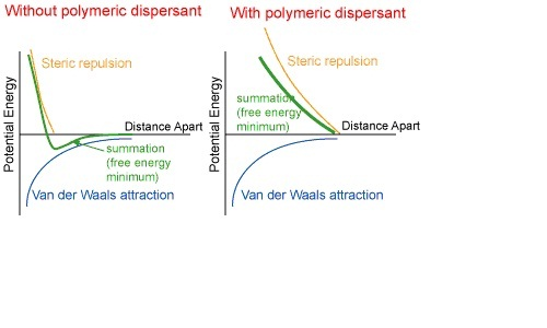 Courbes énergies potentielles